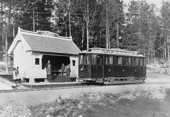 Normalspårigspårvagn typ 51 vid Långängstorps anhalt.